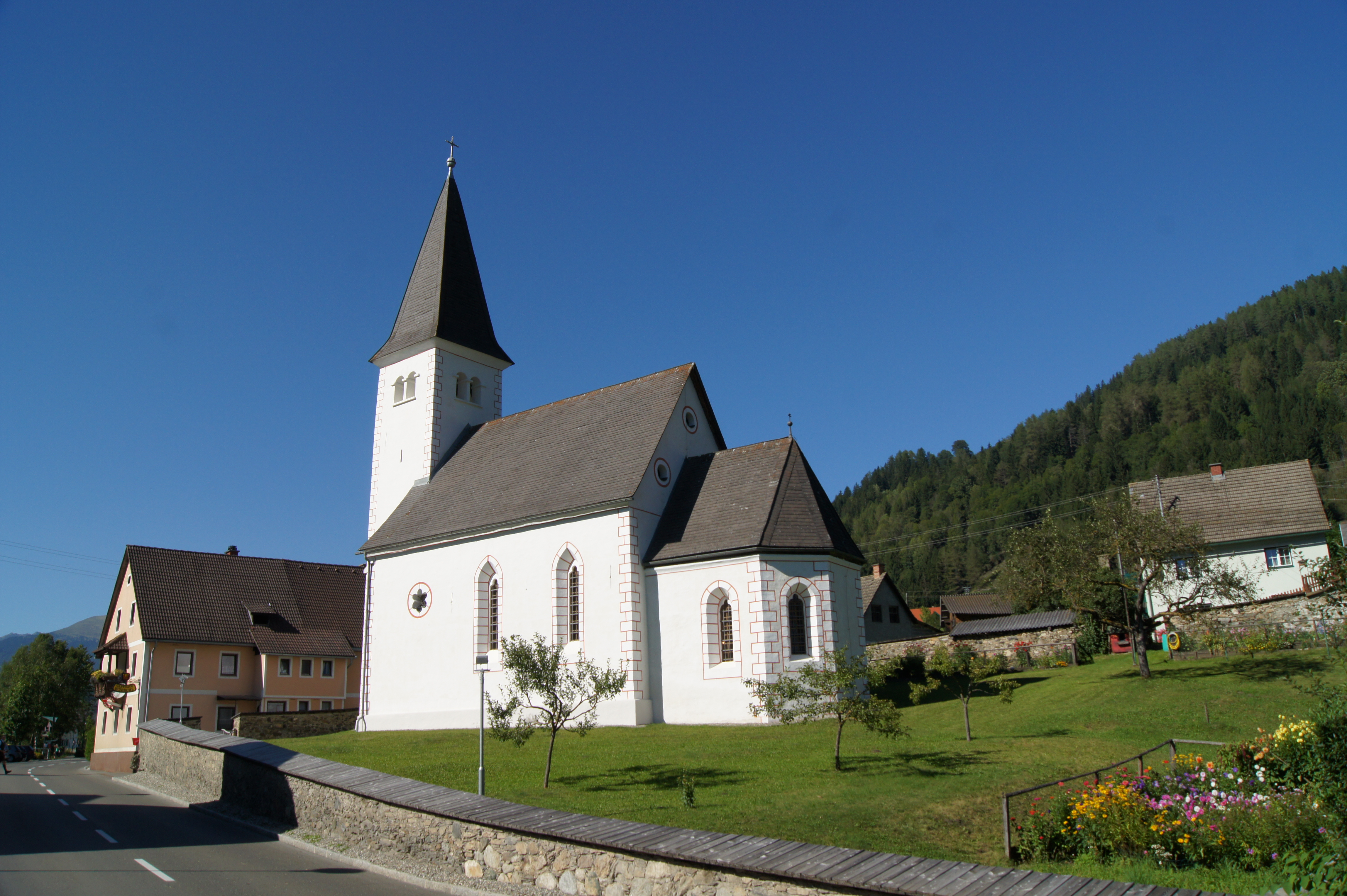 Kath. Filialkirche hl. Bartholomäus mit ehem. Friedhof